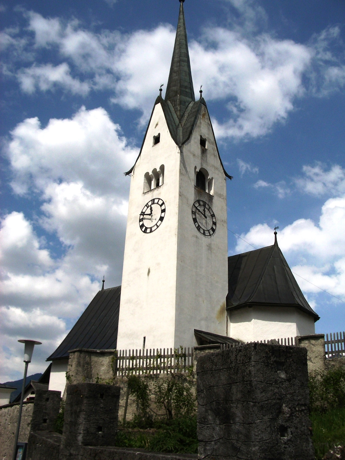 Valendas GR, Switzerland